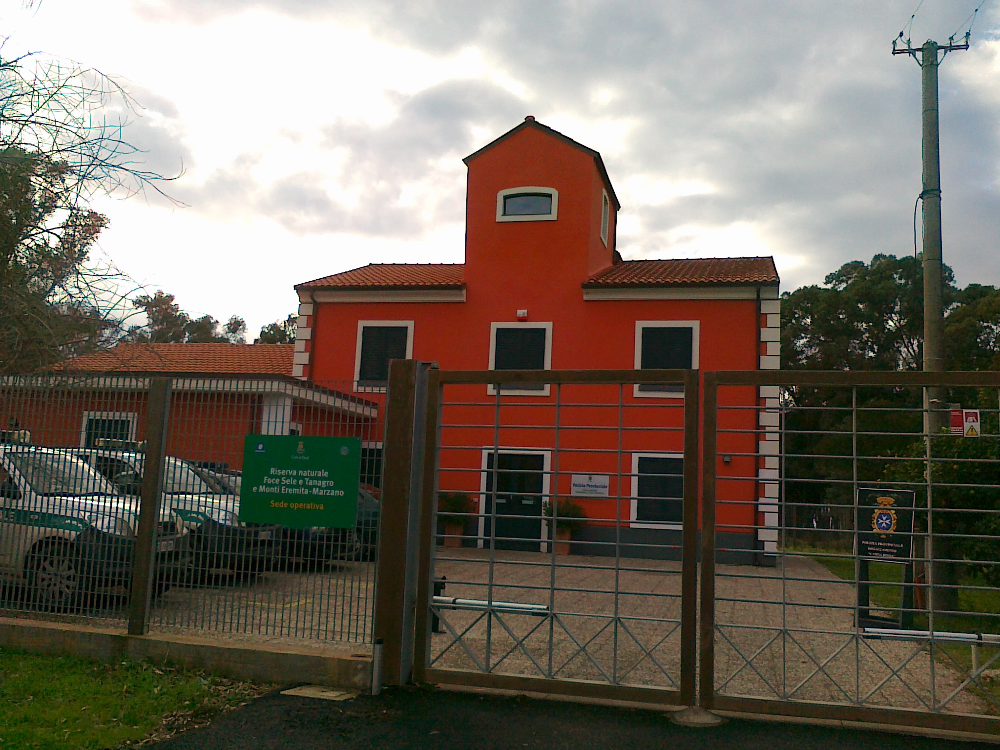 La sede distaccata della Polizia Provinciale di Salerno nel comune di Eboli, all'interno della riserva naturale Sele-Tanagro